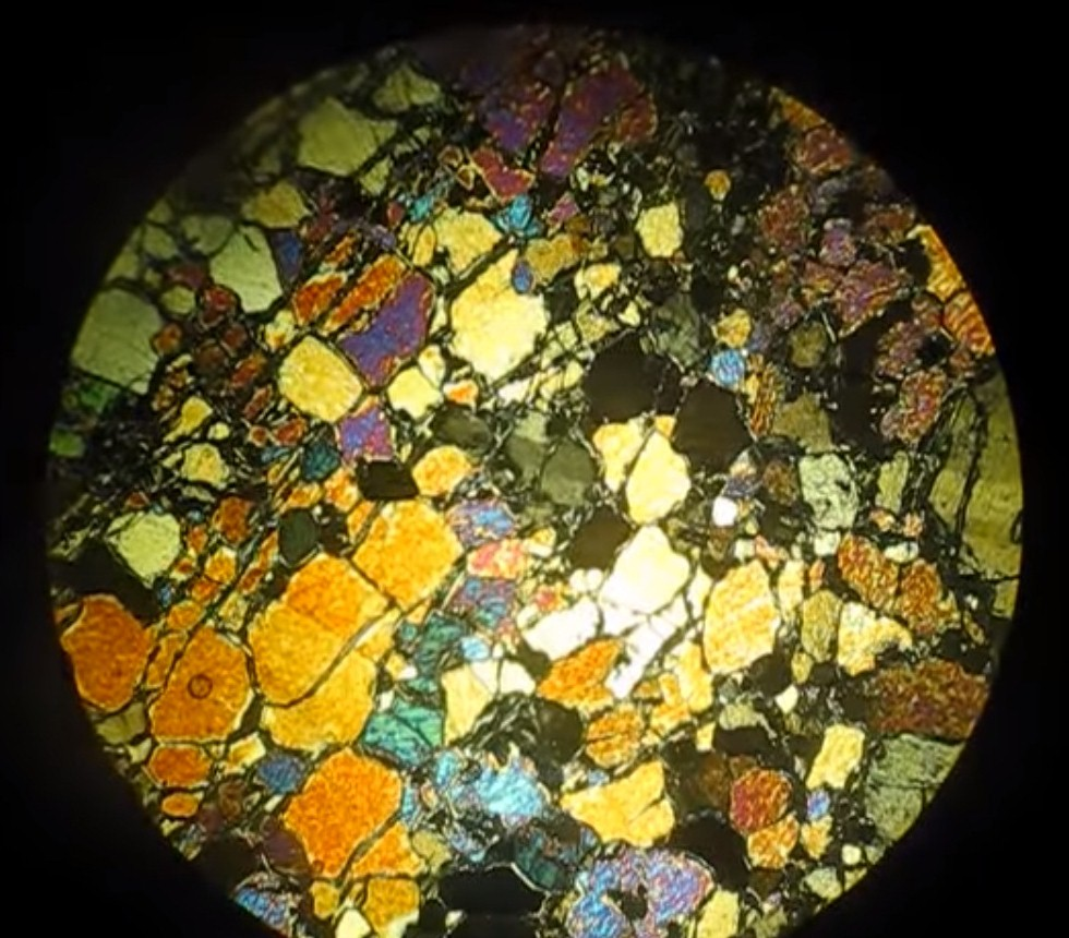 microscopic image of Olivine in polarizing light